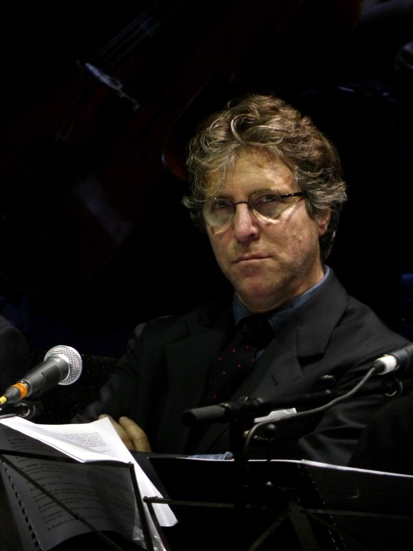 Riccardo Rossi al Lucca Comics 2014